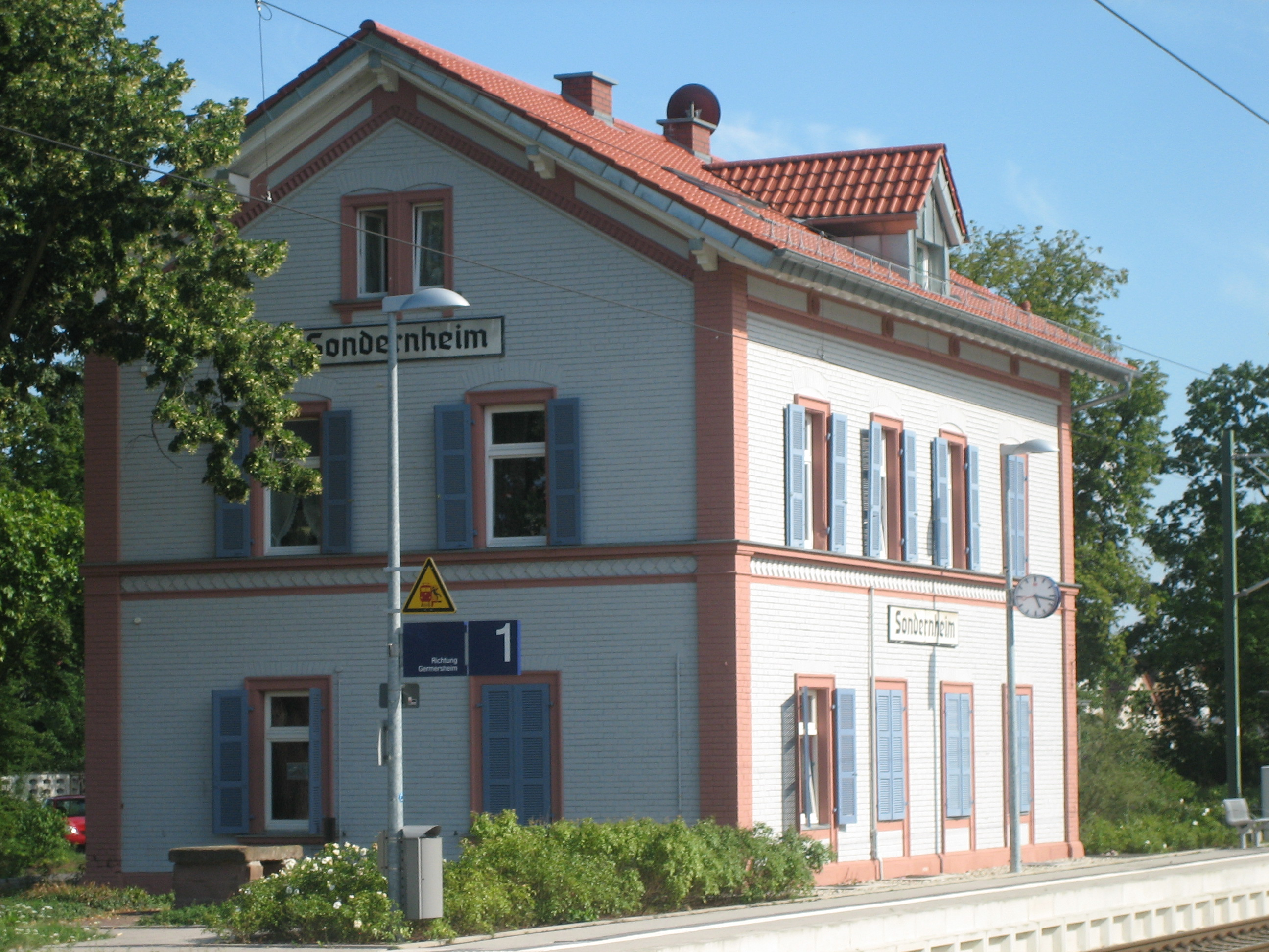 Ehemaliges Empfangsgebäude des Bf. Sondernheim